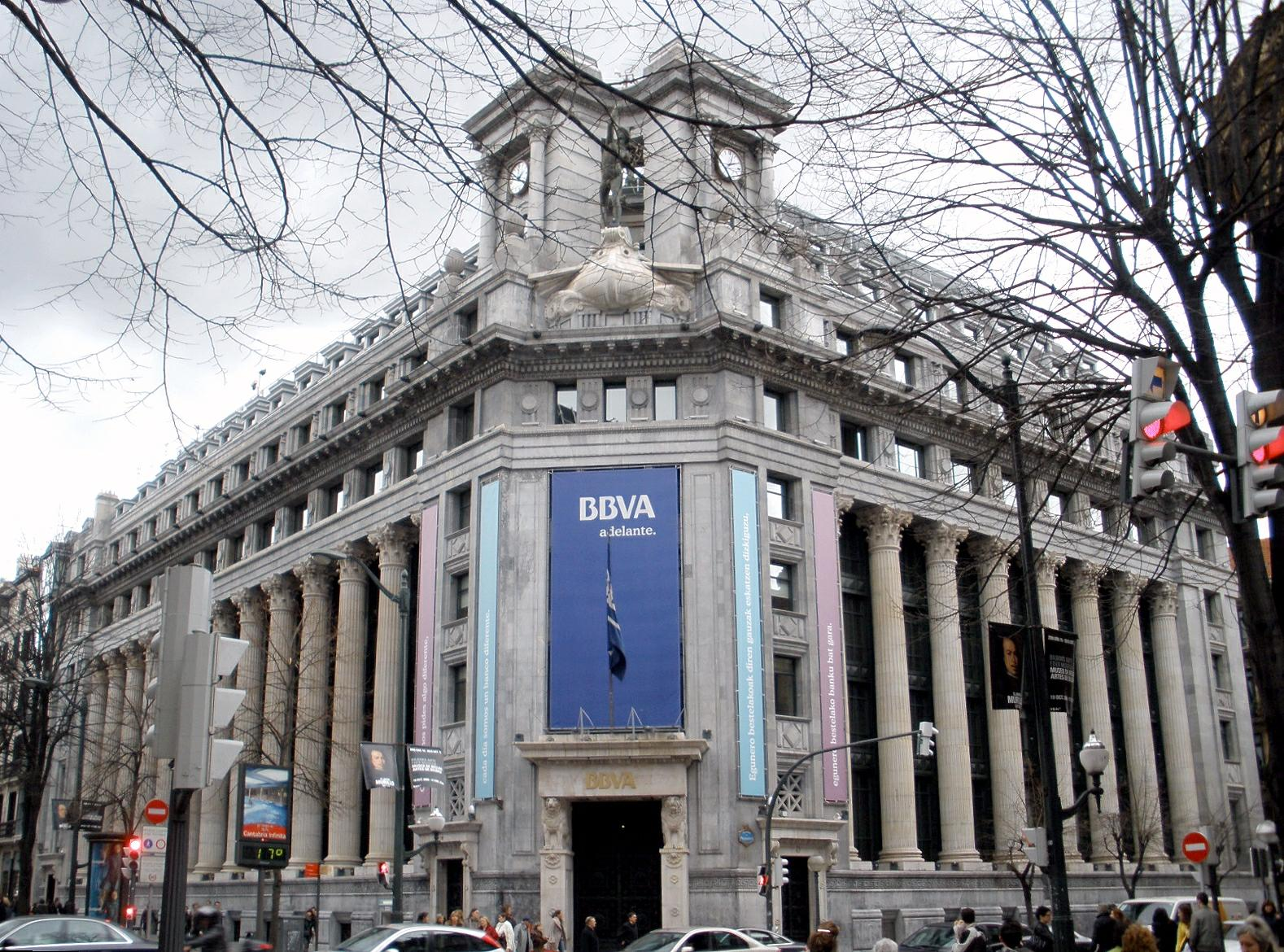 Antigua sede del Banco de Comercio en Bilbao, hoy BBVA. Bilbao, País Vasco, España.